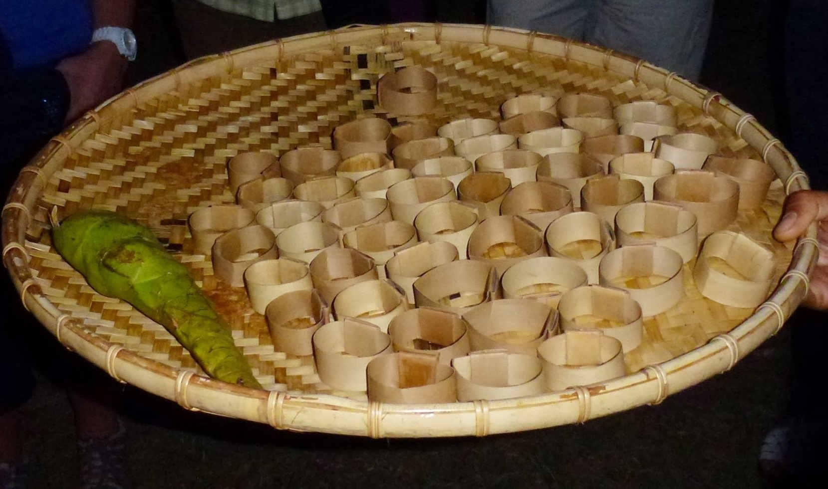 Laos, Don Khong, préparation du plateau pour le riz gluant